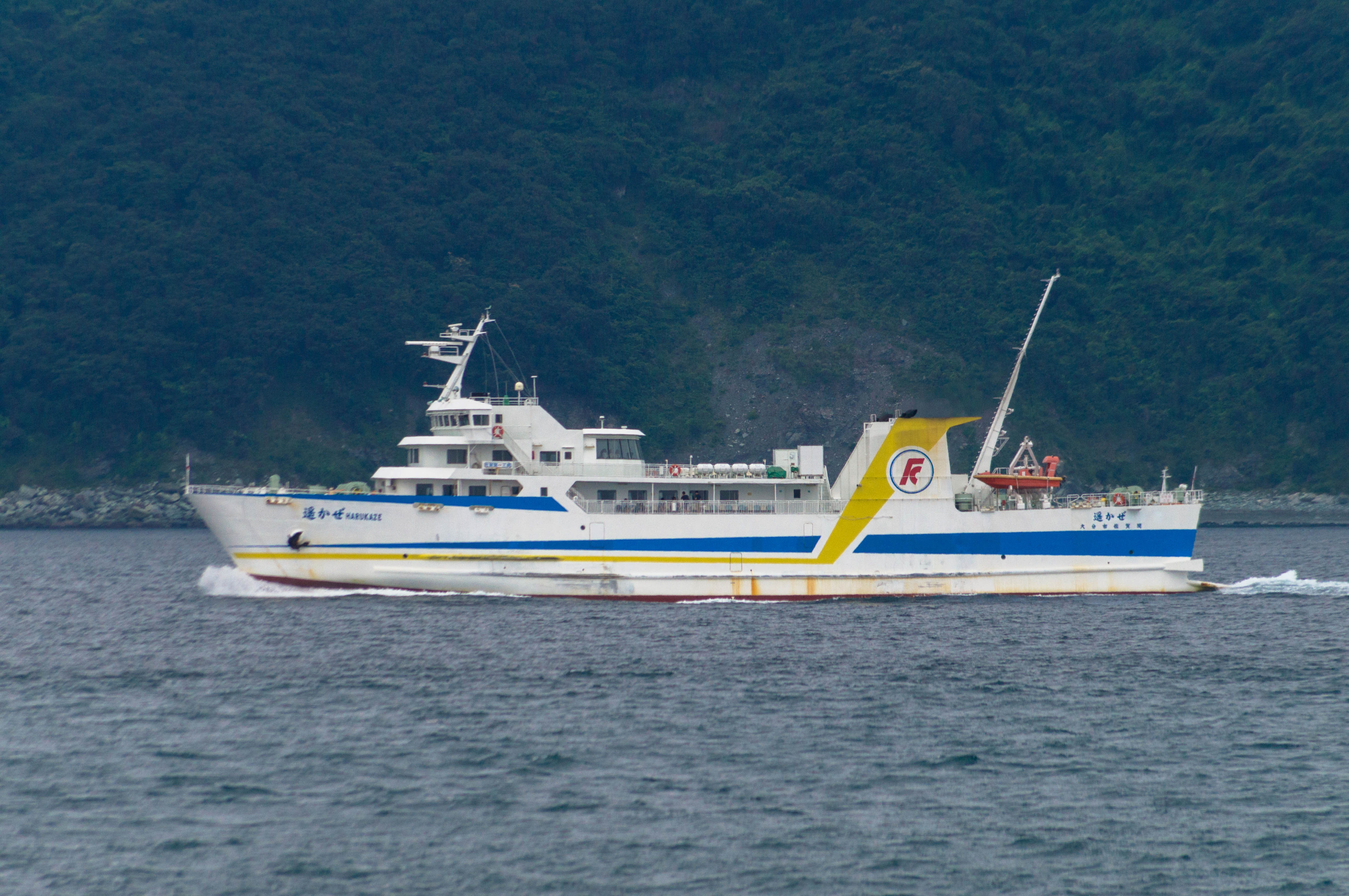 国道九四フェリー「遥かぜ」（2016年7月17日、三崎港沖）